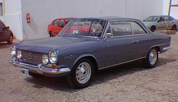 I.K.A Torino 380w